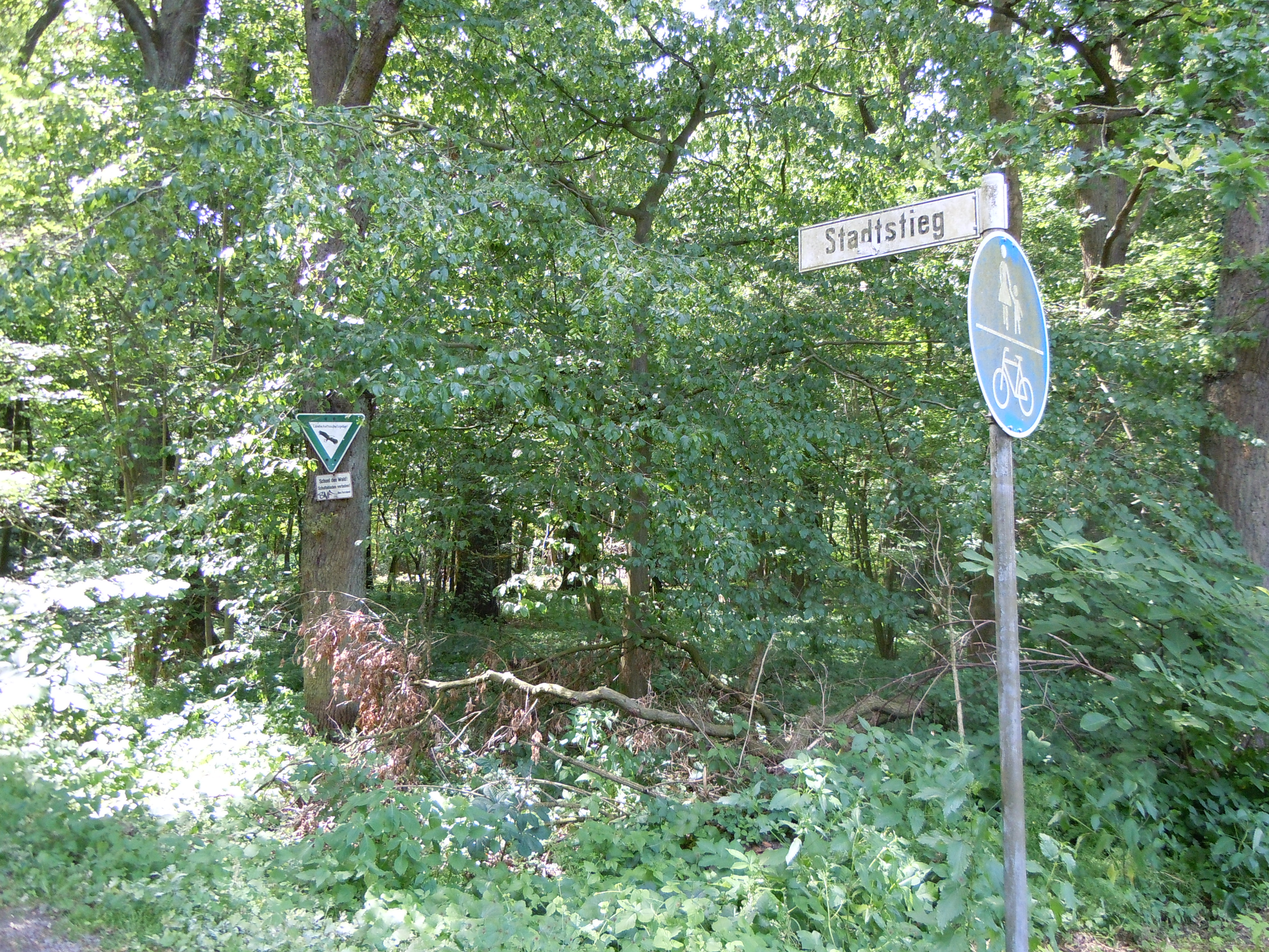 Das Naturschutzgebiet „Mascheroder- und Rautheimer Holz“ (NSG BR 153, Verordnung 29. Dezember 2018) hat im Bereich der Stadt Braunschweig das Landschaftsschutzgebiet „Mascheroder-, Rautheimer- und Salzdahlumer Holz“ ersetzt. Die Aufnahme zeigt einen Ausschnitt aus dem Mascheroder Holz. Das LSG-Schild wurde noch nicht durch ein NSG-Schild ersetzt.